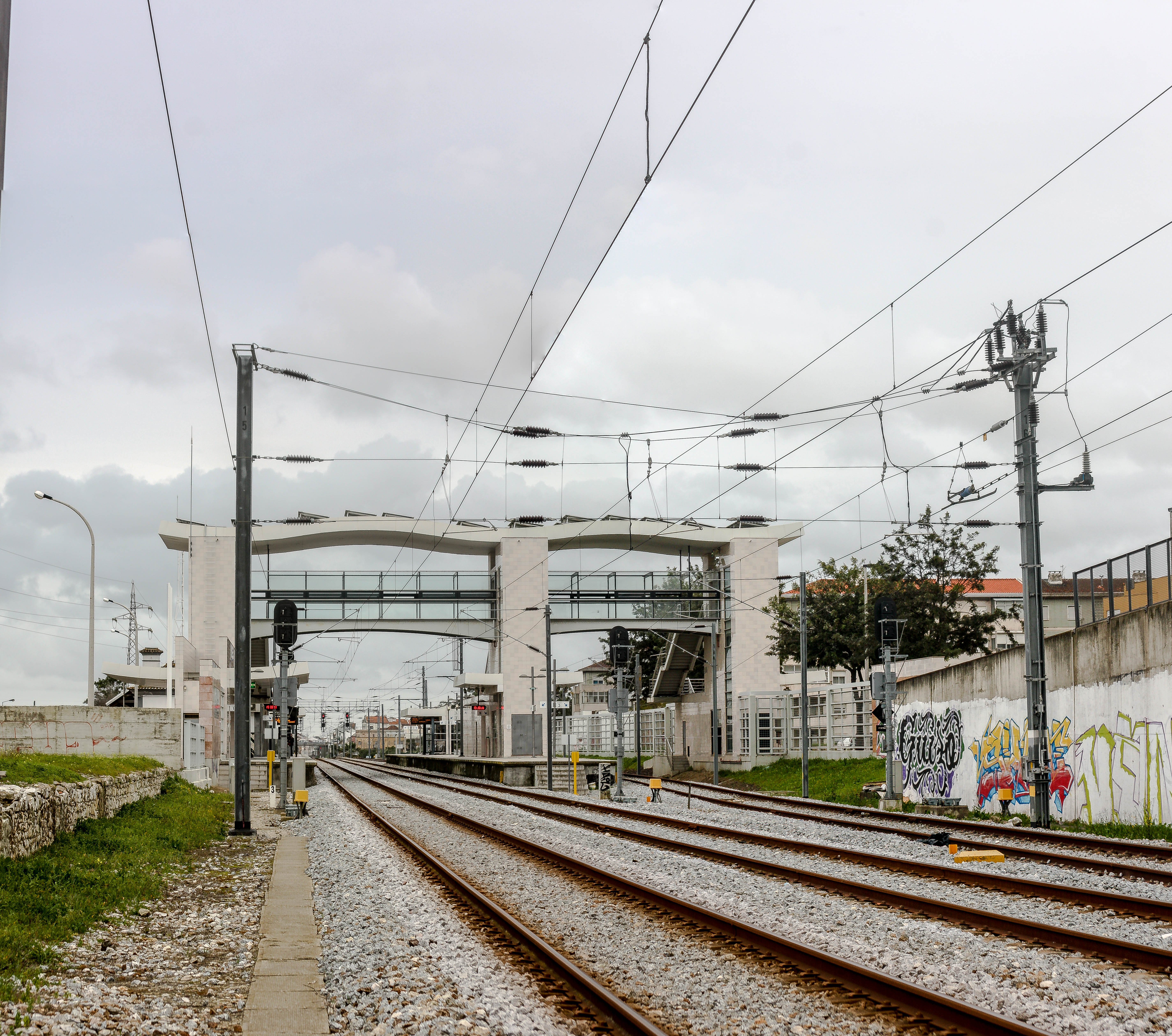 Panorama da estação.